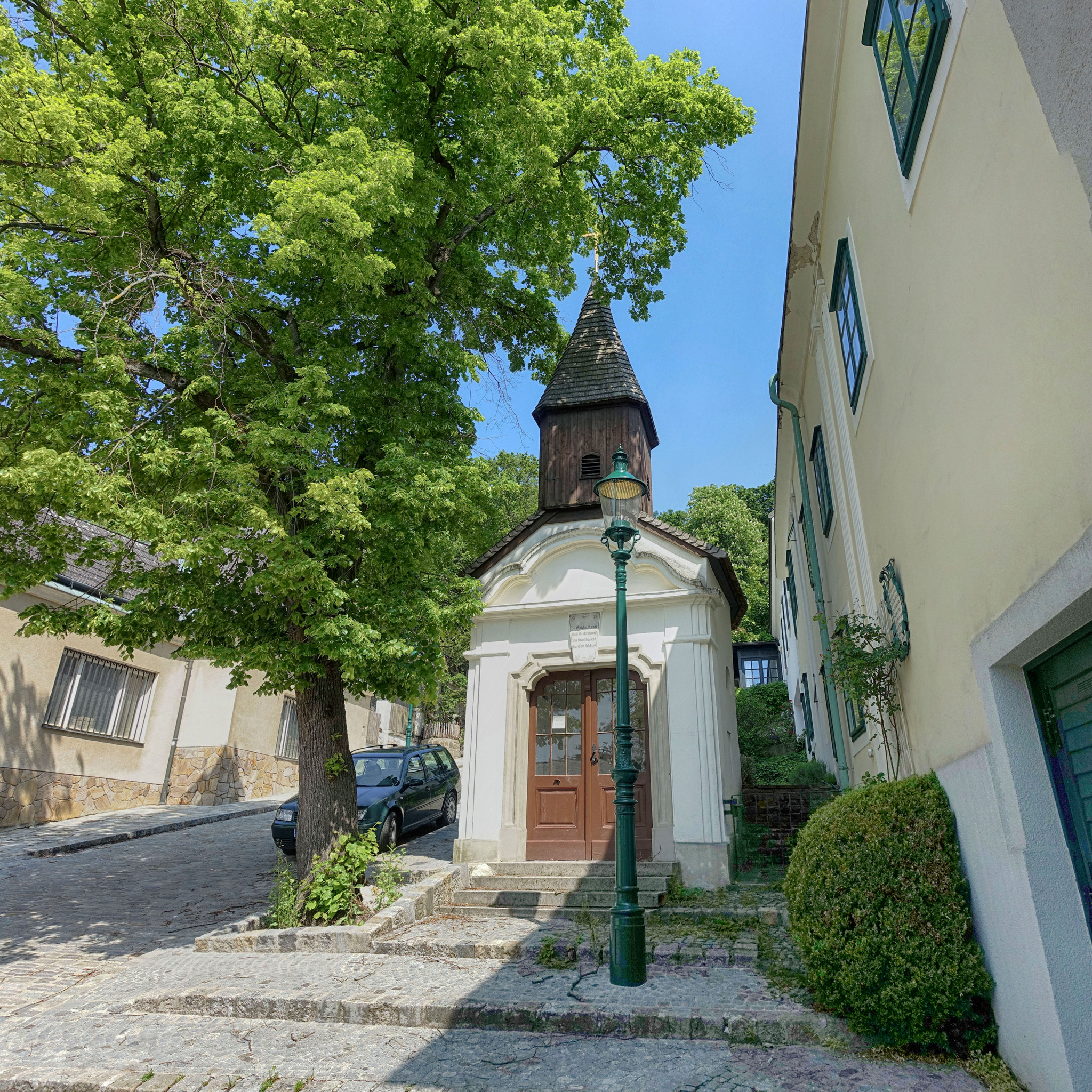 Die Sebastiankapelle in der Dreimarksteingasse, geweiht dem Hl. Sebastian, Schutzpatron Salmannsdorfs. 'Salmannsdorf' (Q1255079)